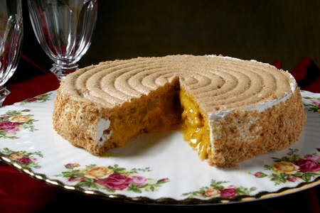 Torta Ostiglia - originale della Pasticceria Gamba